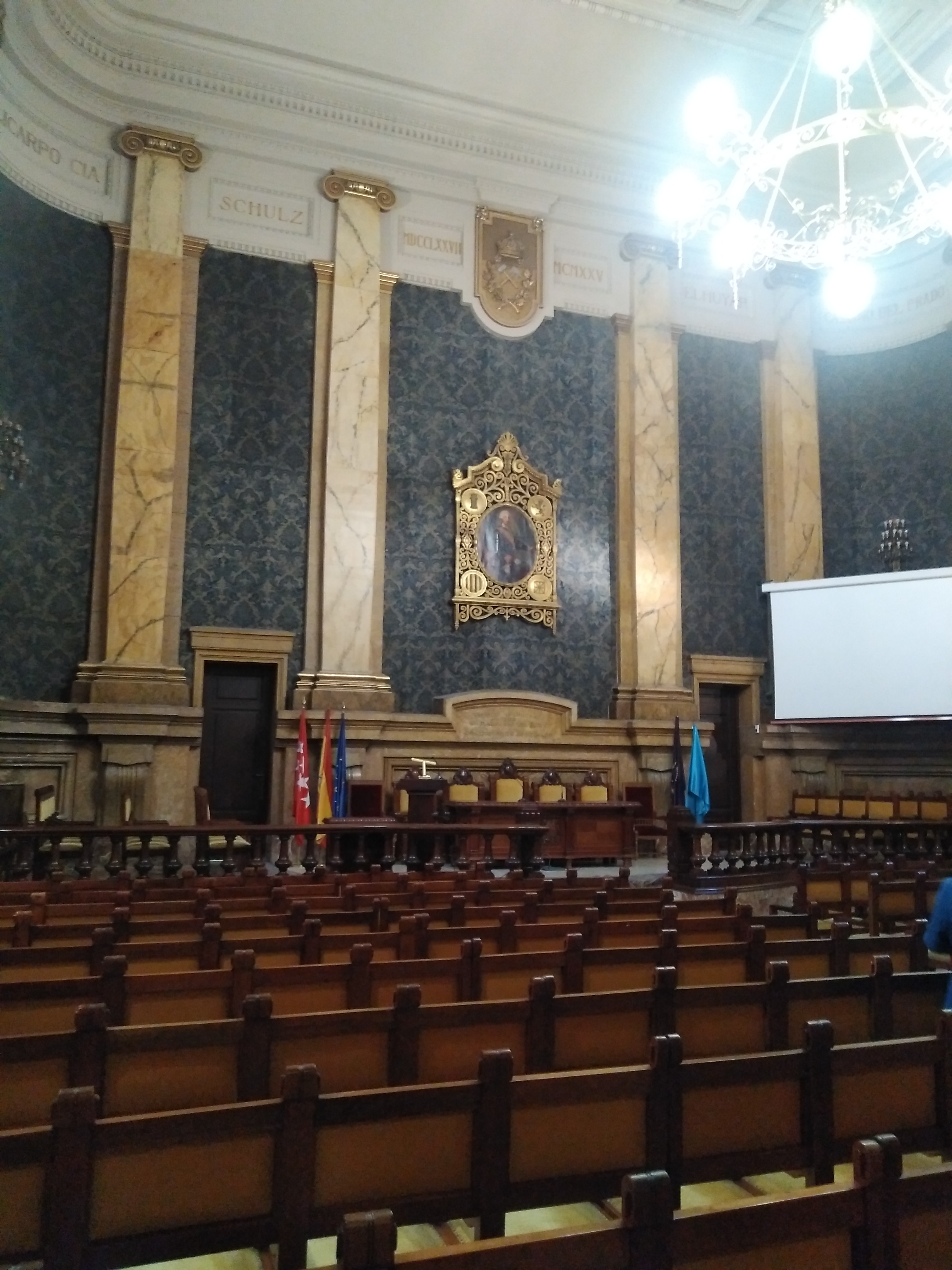 Salón de actos de la Escuela Técnica Superior de Ingenieros de Minas y Energía de la Universidad Politécnica de Madrid